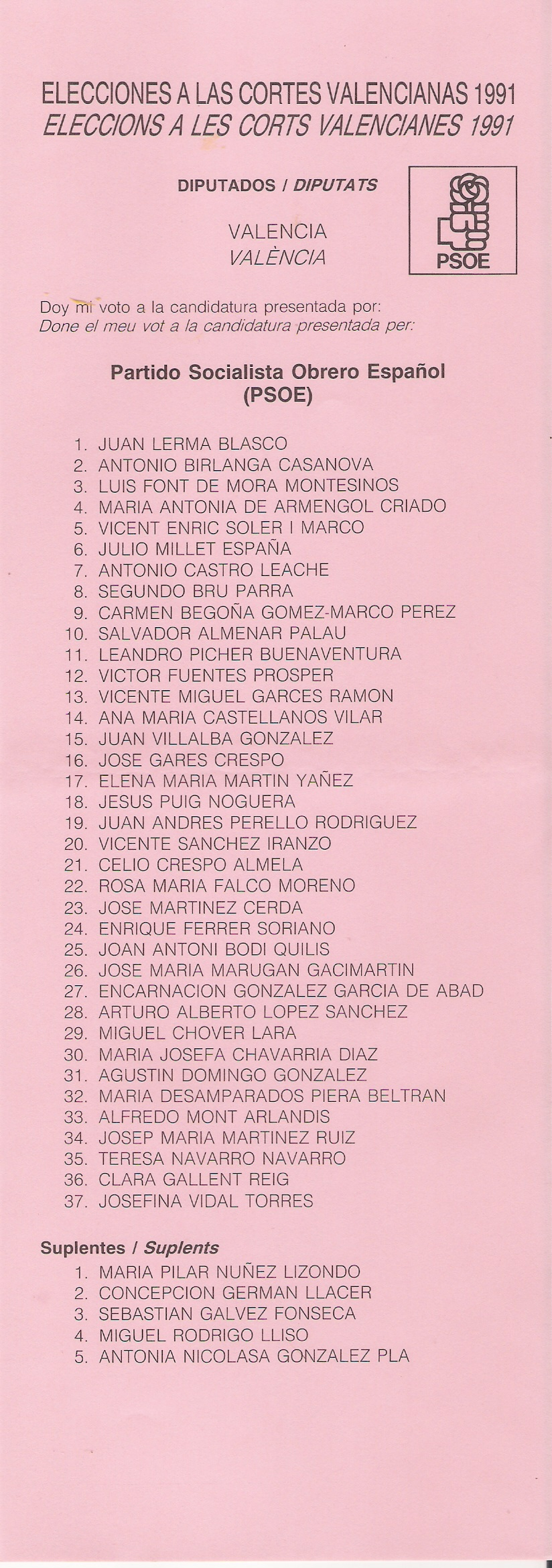 Papeleta electoral del PSOE por la provincia de Valencia para las Cortes Valencianas, en 1991.